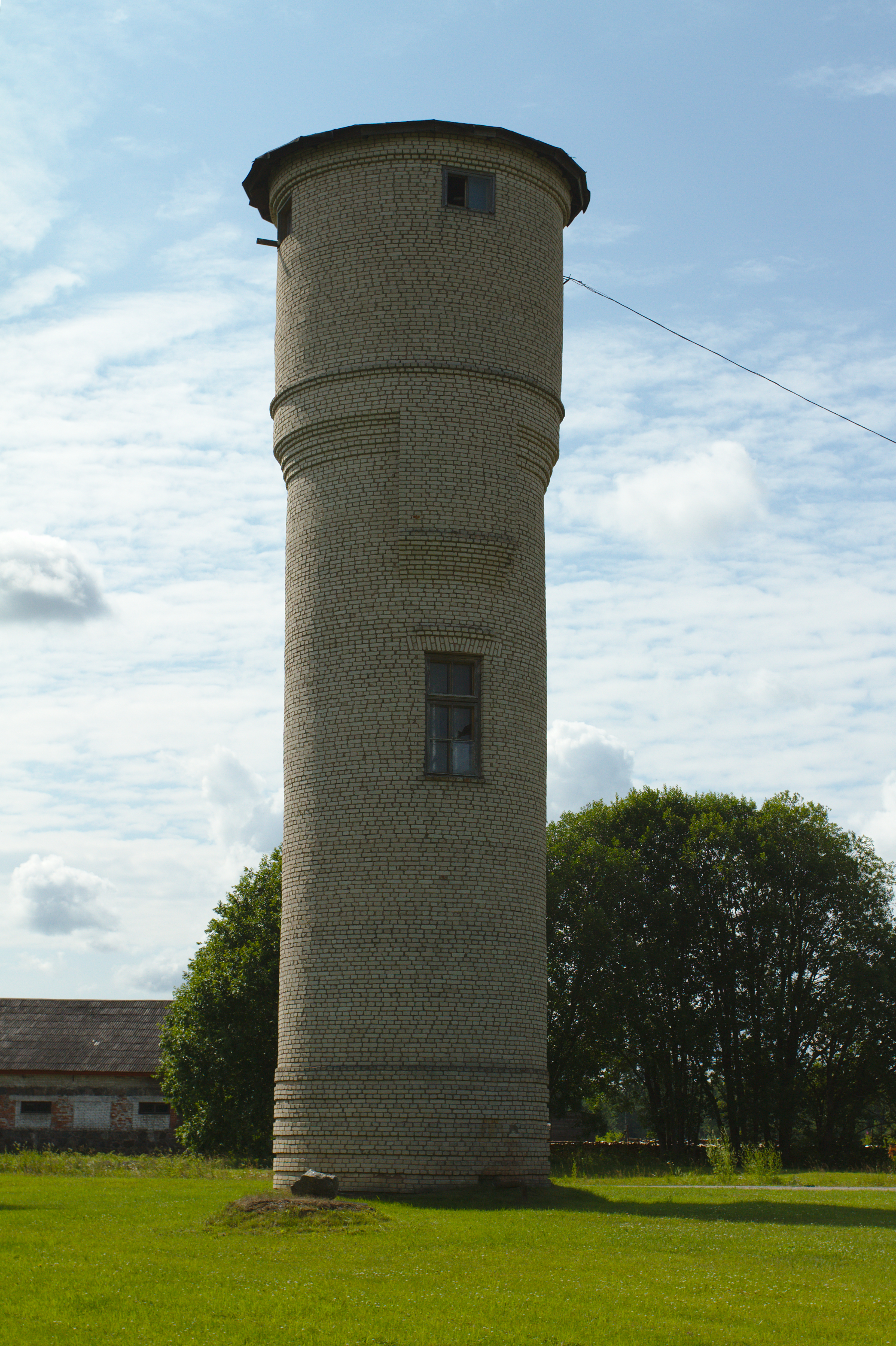 Veetorn